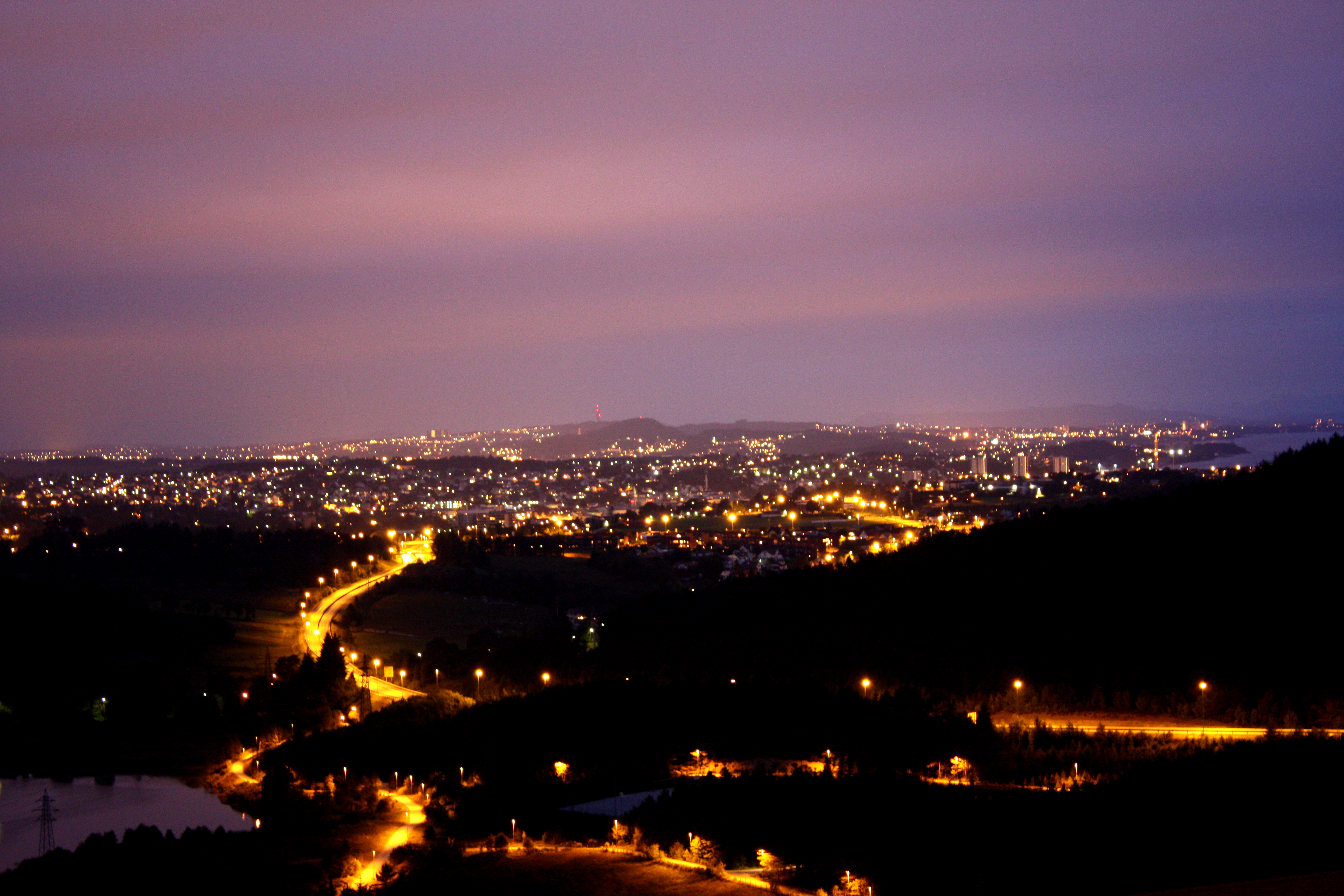 Sandnes om kvelden, sett frå Bogafjell i sør